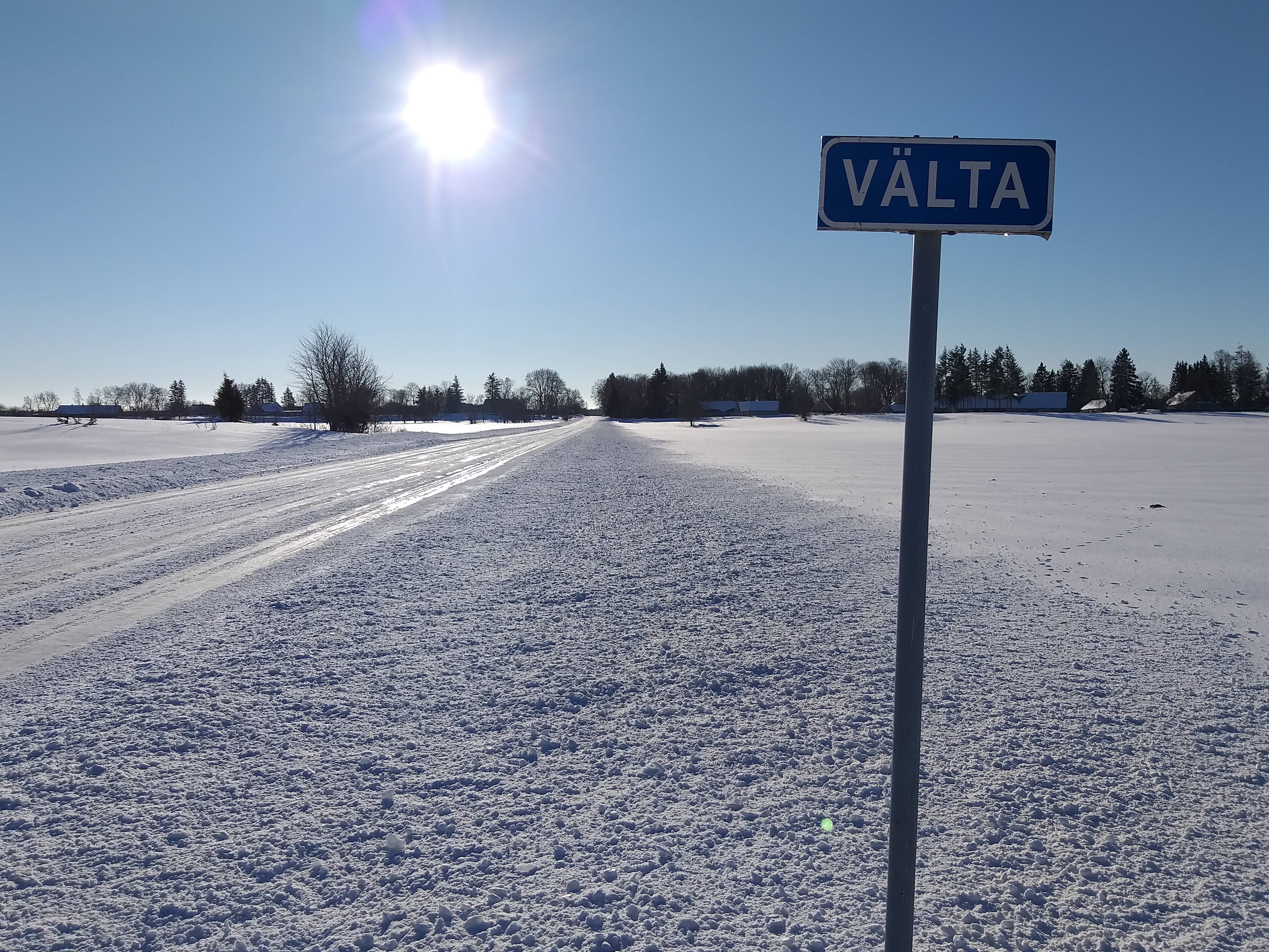 Vaade Välta külale Audla - Saareküla - Tornimäe - Väike väin kõrvalmaanteelt